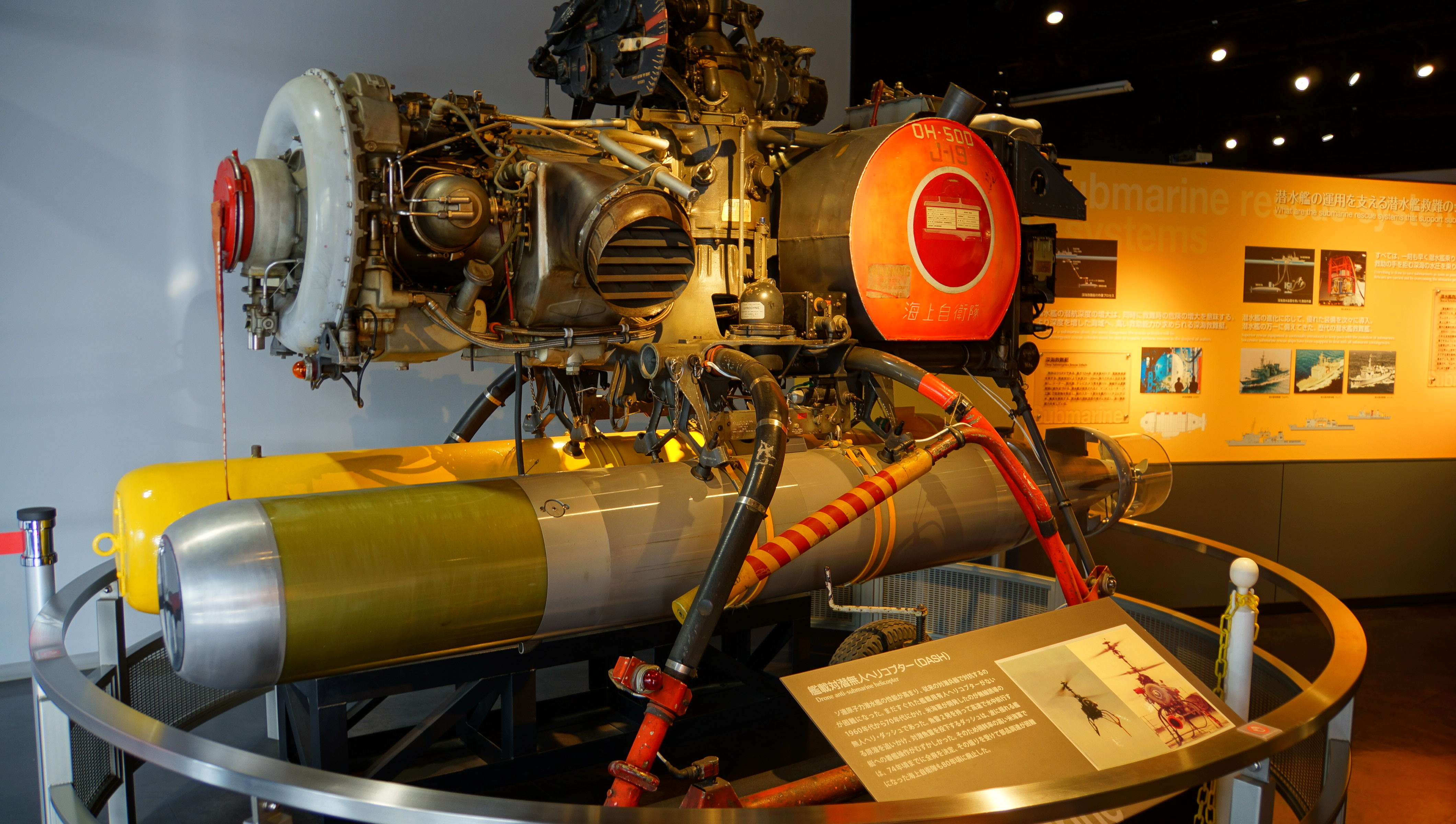 海上自衛隊 QH-50D DASH艦載無人対潜ヘリコプター（D-19号機）。 14年9月15日 海上自衛隊呉史料館内にて。